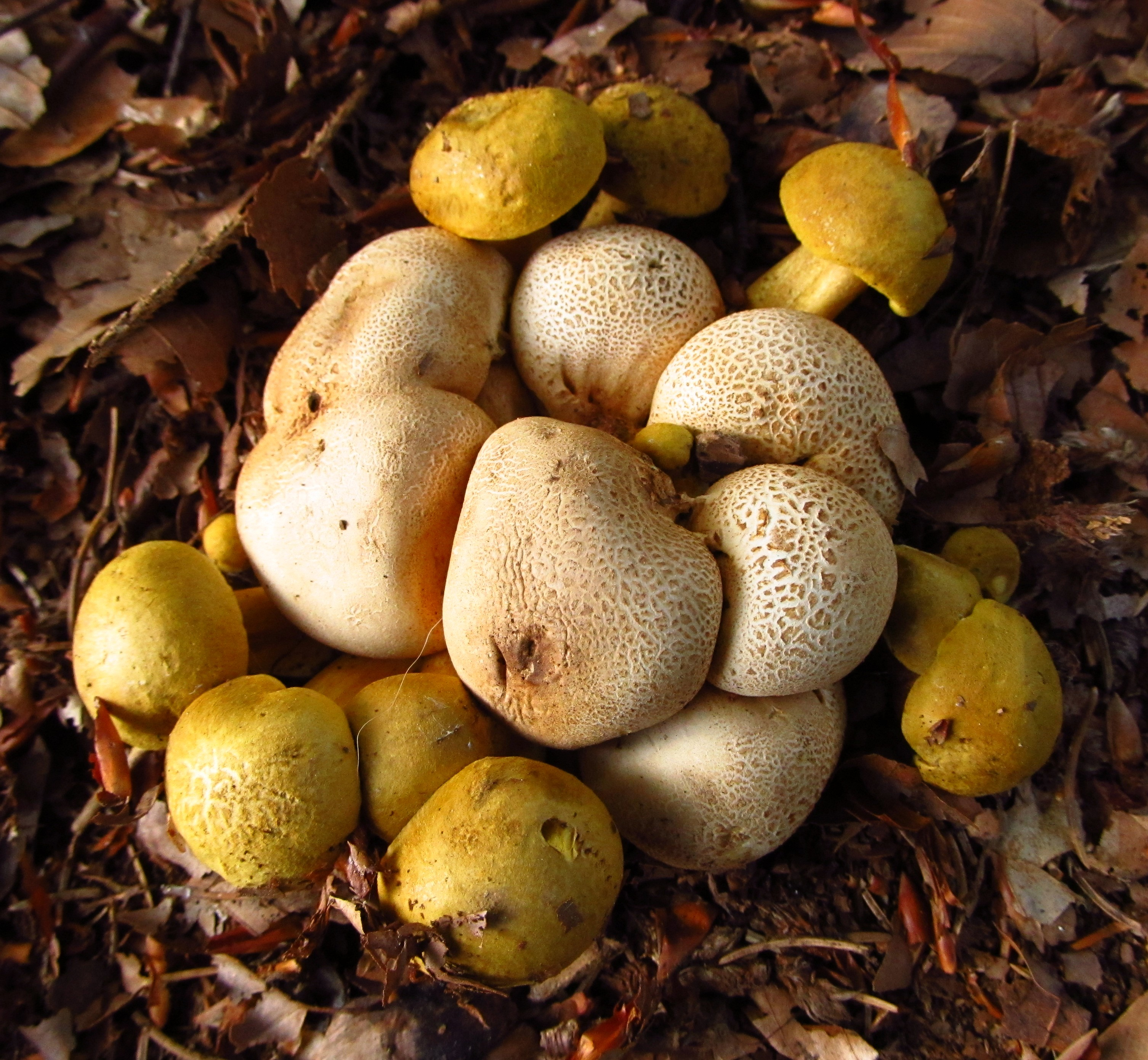 Der Parasitische Röhrling (Pseudoboletus parasiticus), auch Schmarotzer-Röhrling genannt, ist ein recht seltener Pilz, welcher als Parasit ausschließlich an Kartoffelbovisten wächst. Photo: 04.10.2011, Hochwald bei Xanten-Marienbaum/ Kreis Wesel/ Niederrhein. In den Jahren davor und seither habe ich keine neuen Exemplare gefunden.